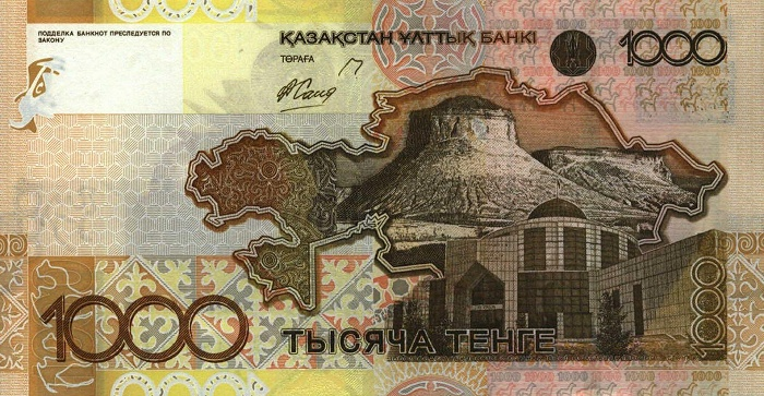 1.000 tenge